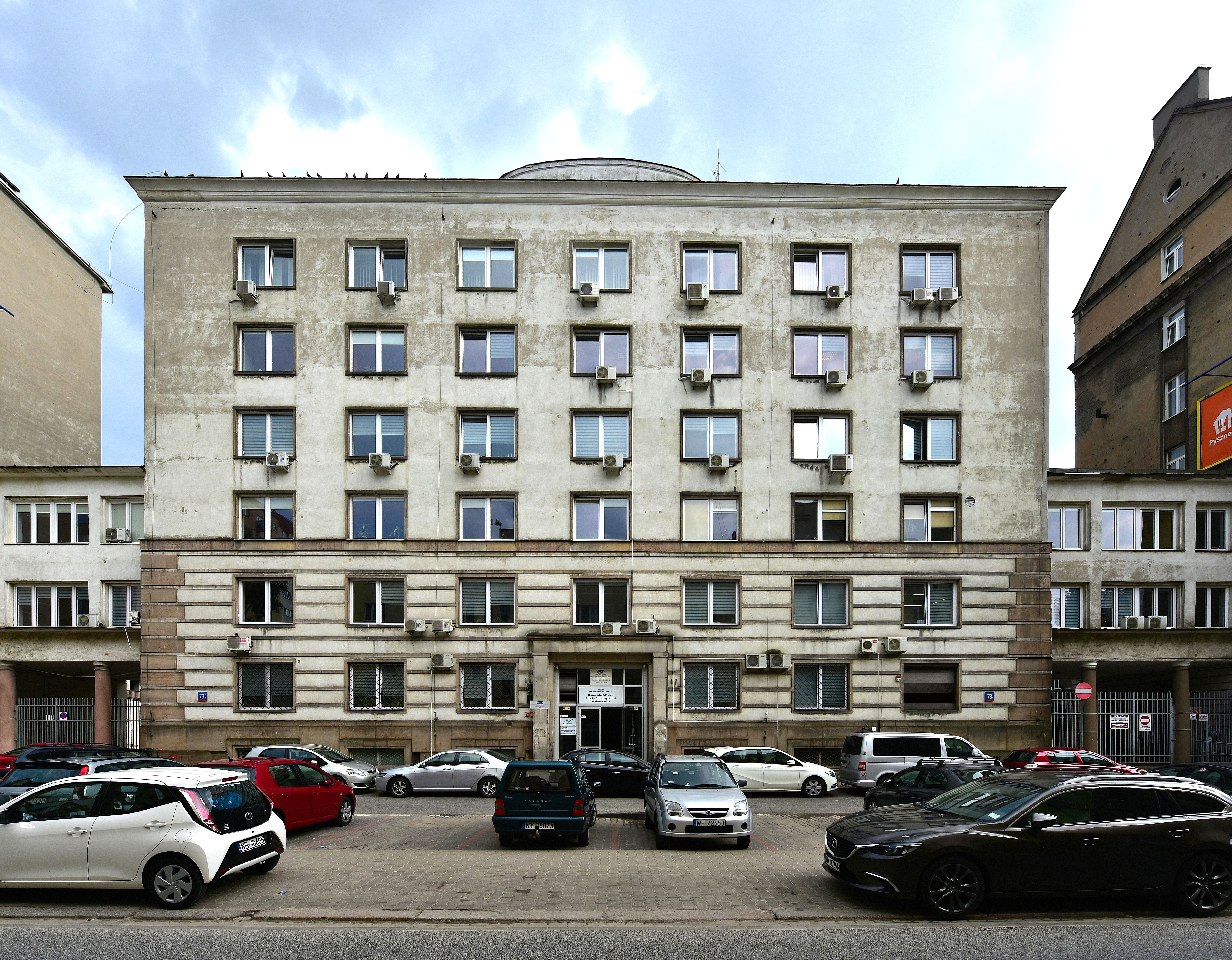 Komenda Główna Straży Ochrony Kolei przy ul. Chmielnej 73a w Warszawie